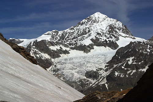 Dent Blanche (???)